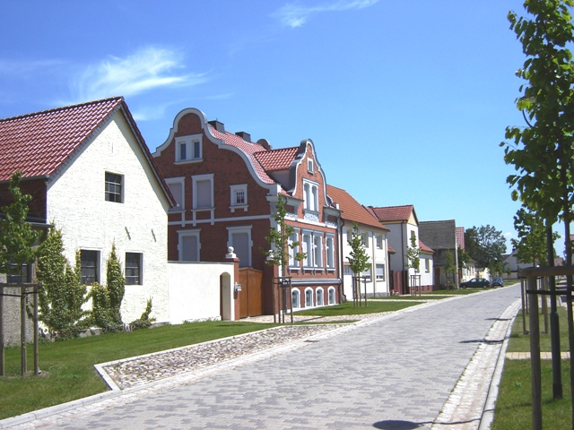 Straßenansicht Gübs (Sachsen-Anhalt)